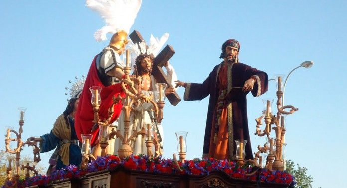 Cristo de la Bendición en el Santo Encuentro en su paso